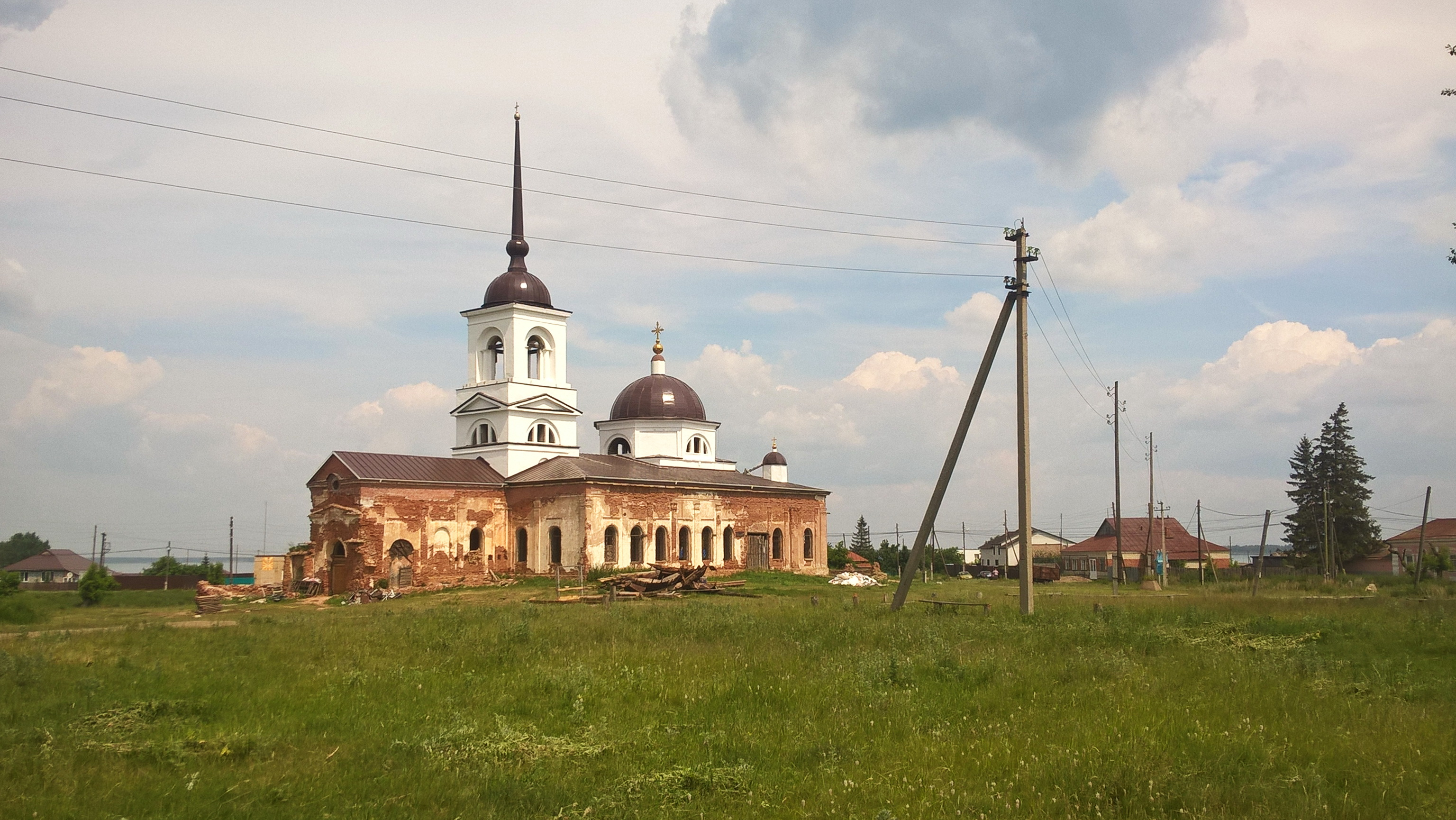 Храм в Огнёво. Восстановление.